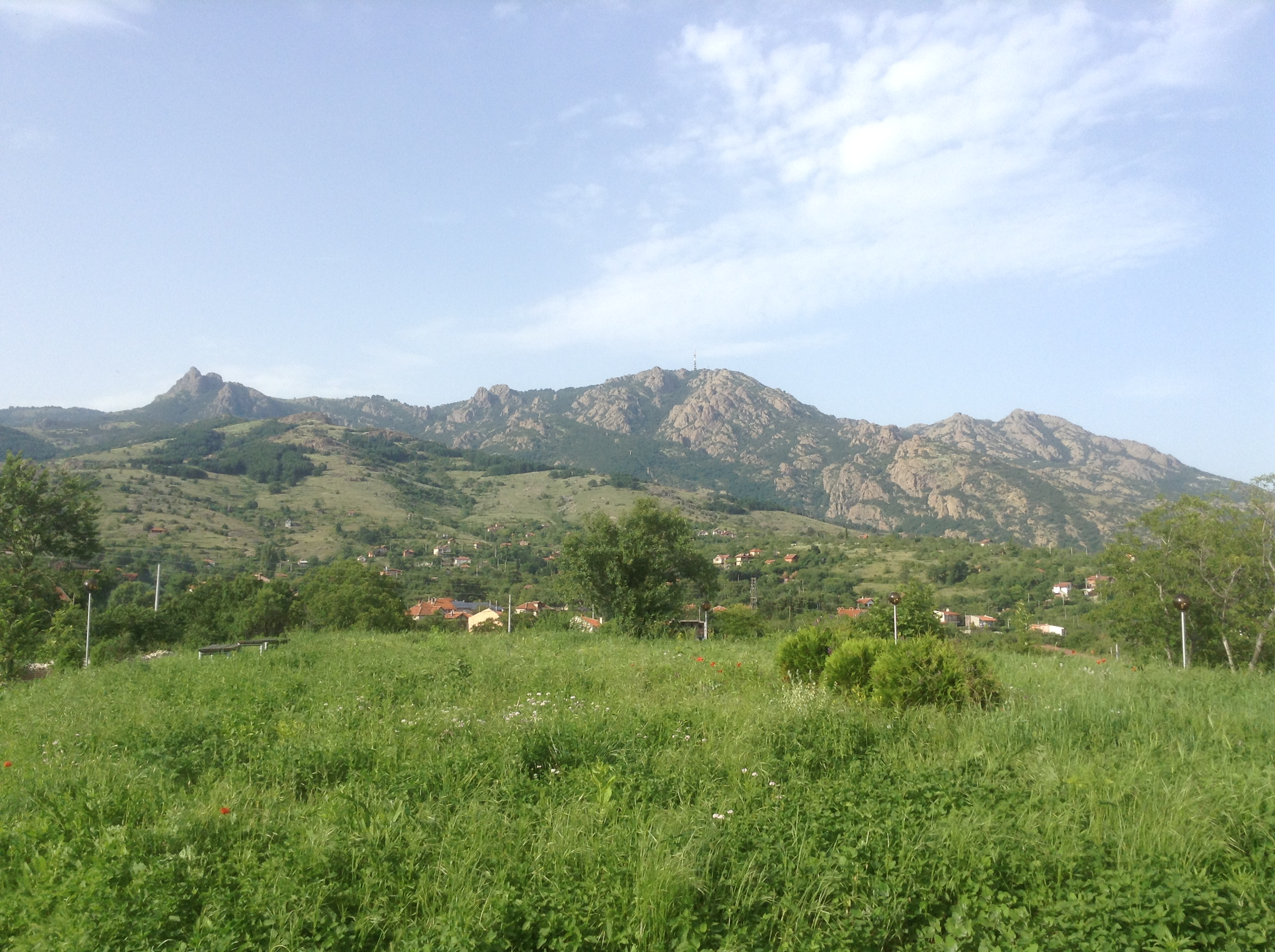 Сините камъни